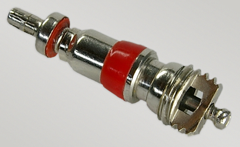 Ventileinsatz/Reifenventil für KFZ-Rad Ventil ist auf der Abbildung geöffnet (wird gegen Federkraft offen gehalten)